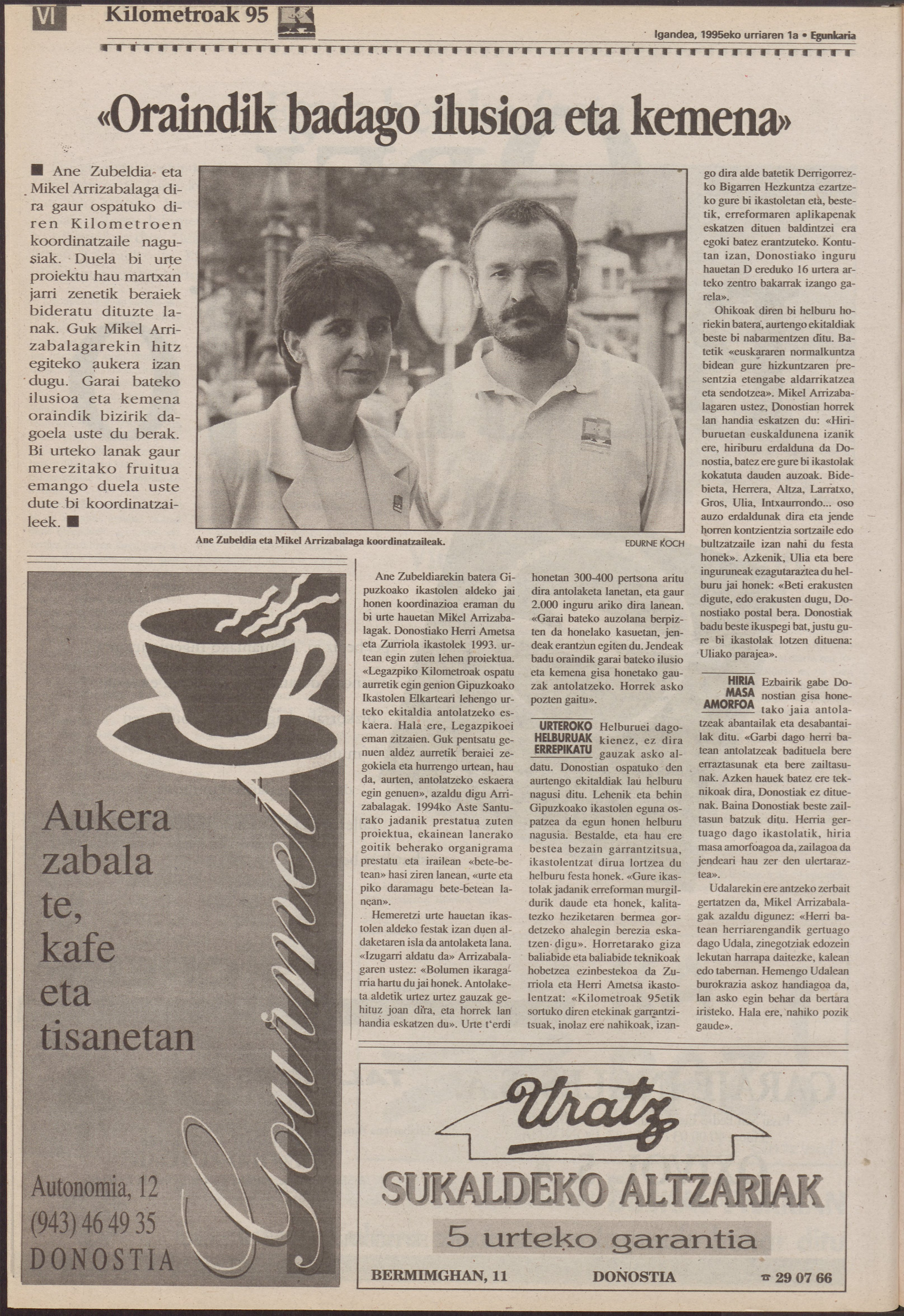 Kilometroak 95, Ane Zubeldia eta Mikel Arrizabalaga koordinatzaile nagusiak